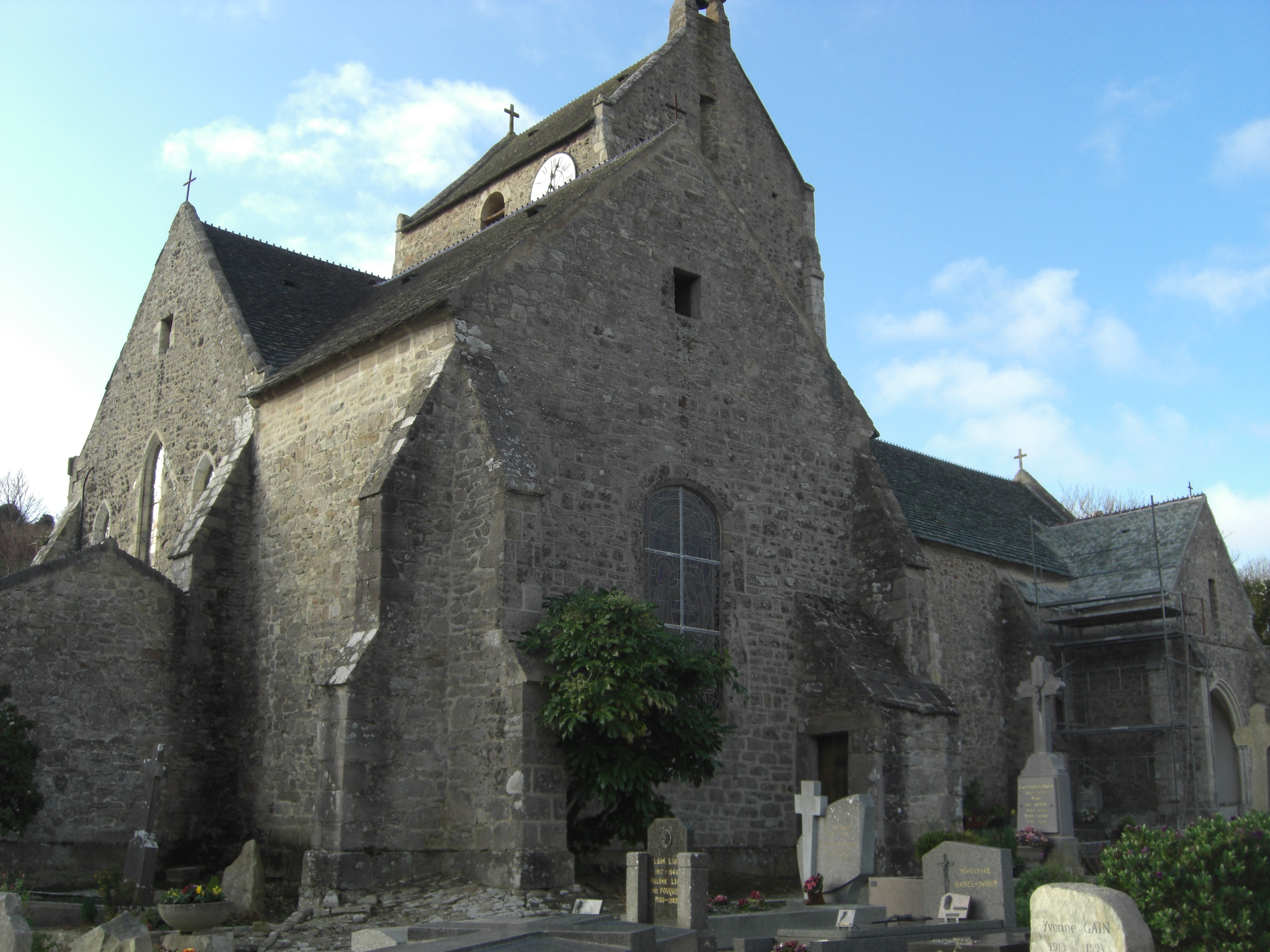 Eglise Saint-Jean-Baptiste Omonville-la-Rogue